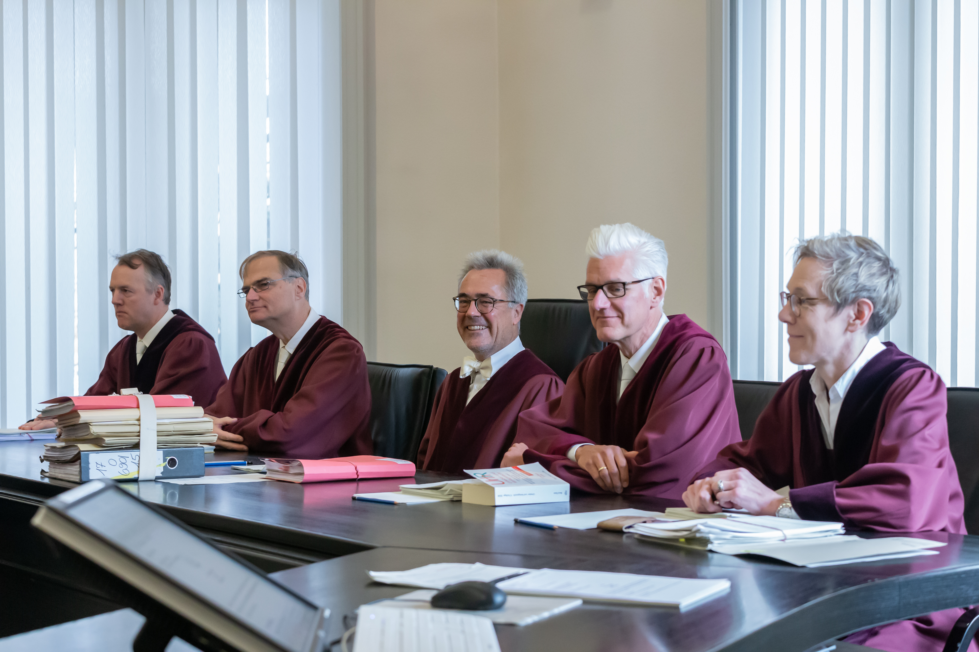 BGH Verhandlungstermin am 31. Oktober 2018 in Sachen I ZR 104/17 (Bundesgerichtshof zur Veröffentlichung von Abbildungen gemeinfreier Kunstwerke): Die Richter des I. Zivilsenats im Gerichtssaal; v.li.: Jörn Feddersen, Wolfgang Kirchhoff, Thomas Koch, Christian Löffler, Christiane Schmaltz